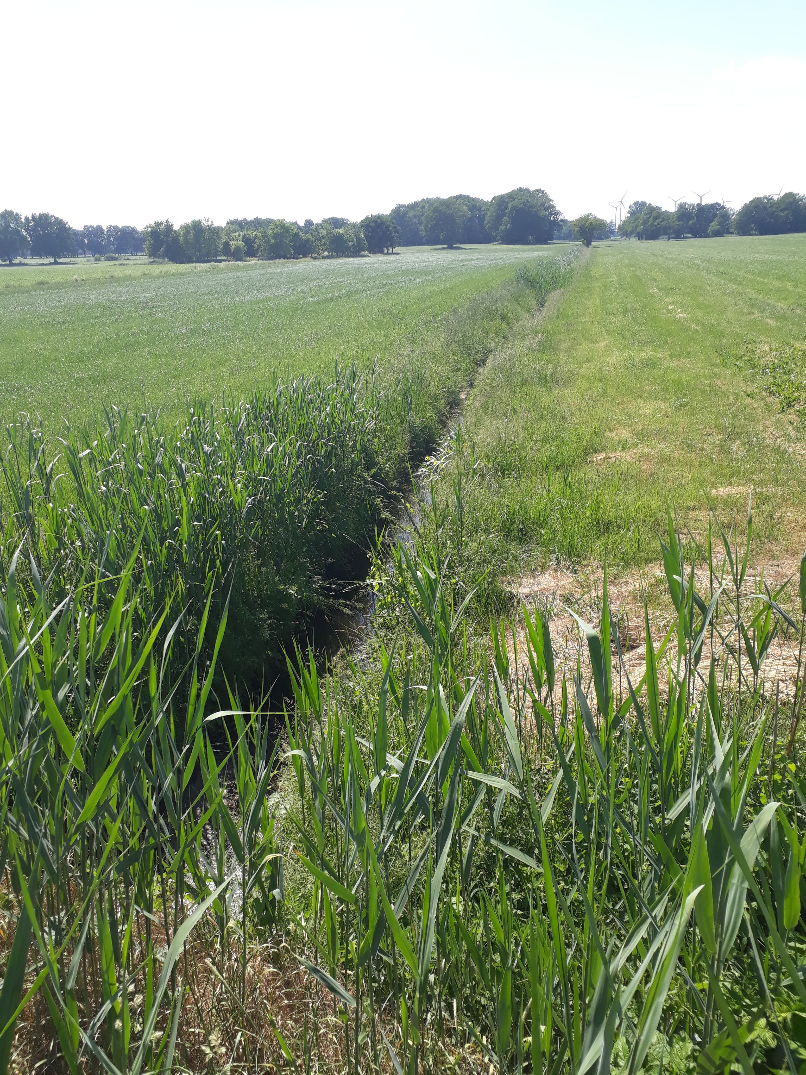 Aue bei Ahrenswohlde.